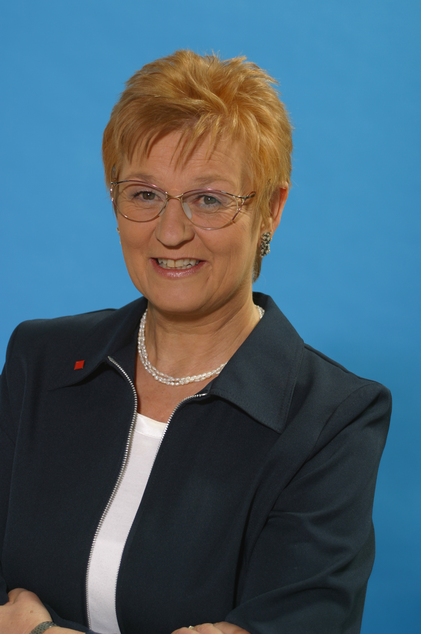 Foto von MdL Heidi Lück, bayerische Landtagsabgeordnete